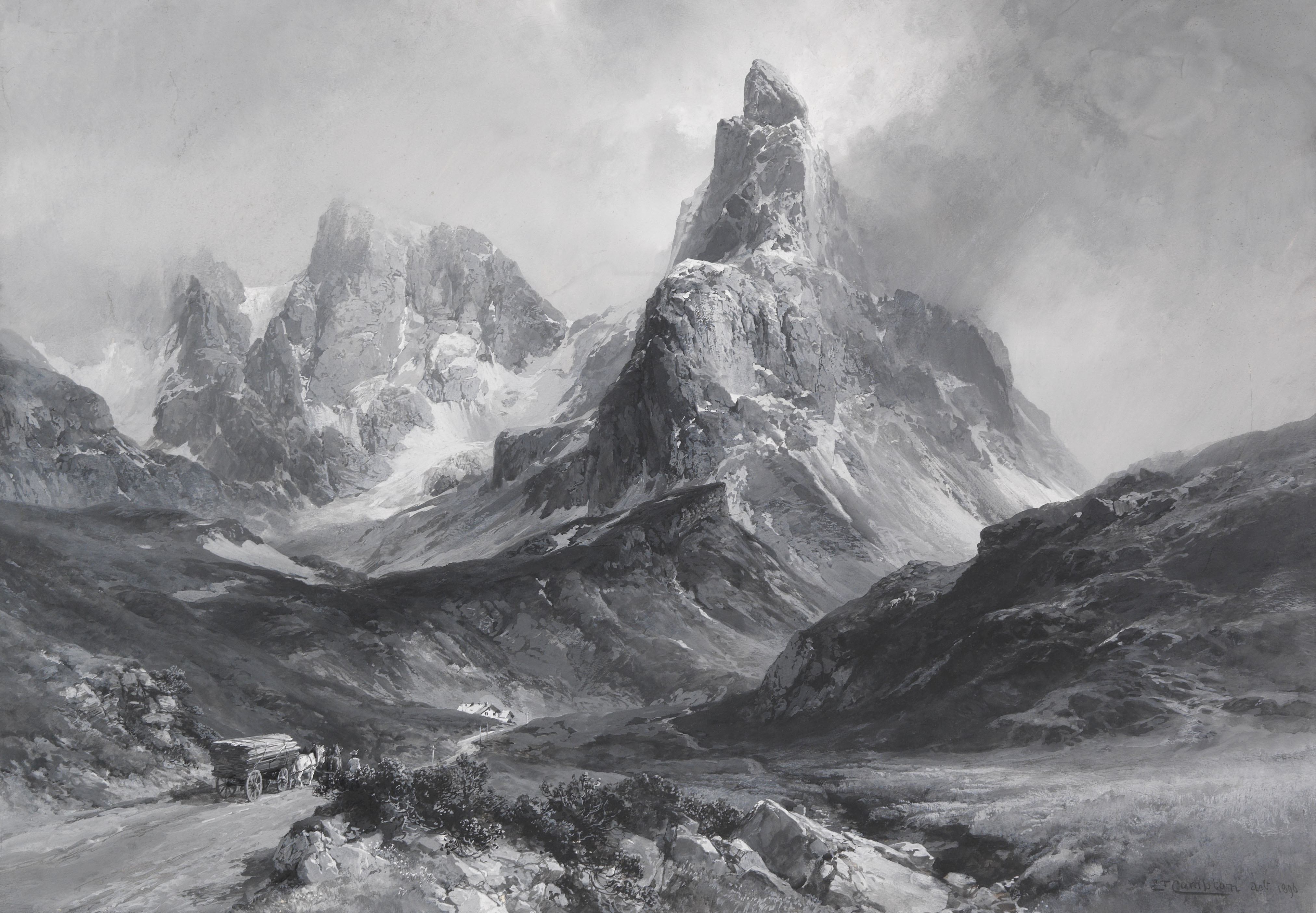 Der Cimon della Pala in den Dolomiten, gesehen vom Rollepass aus. 1896. Grisaille-Gouache. Rechts unten signiert und datiert. Auf Papier, auf Karton kaschiert. 59 x 84,5 cm